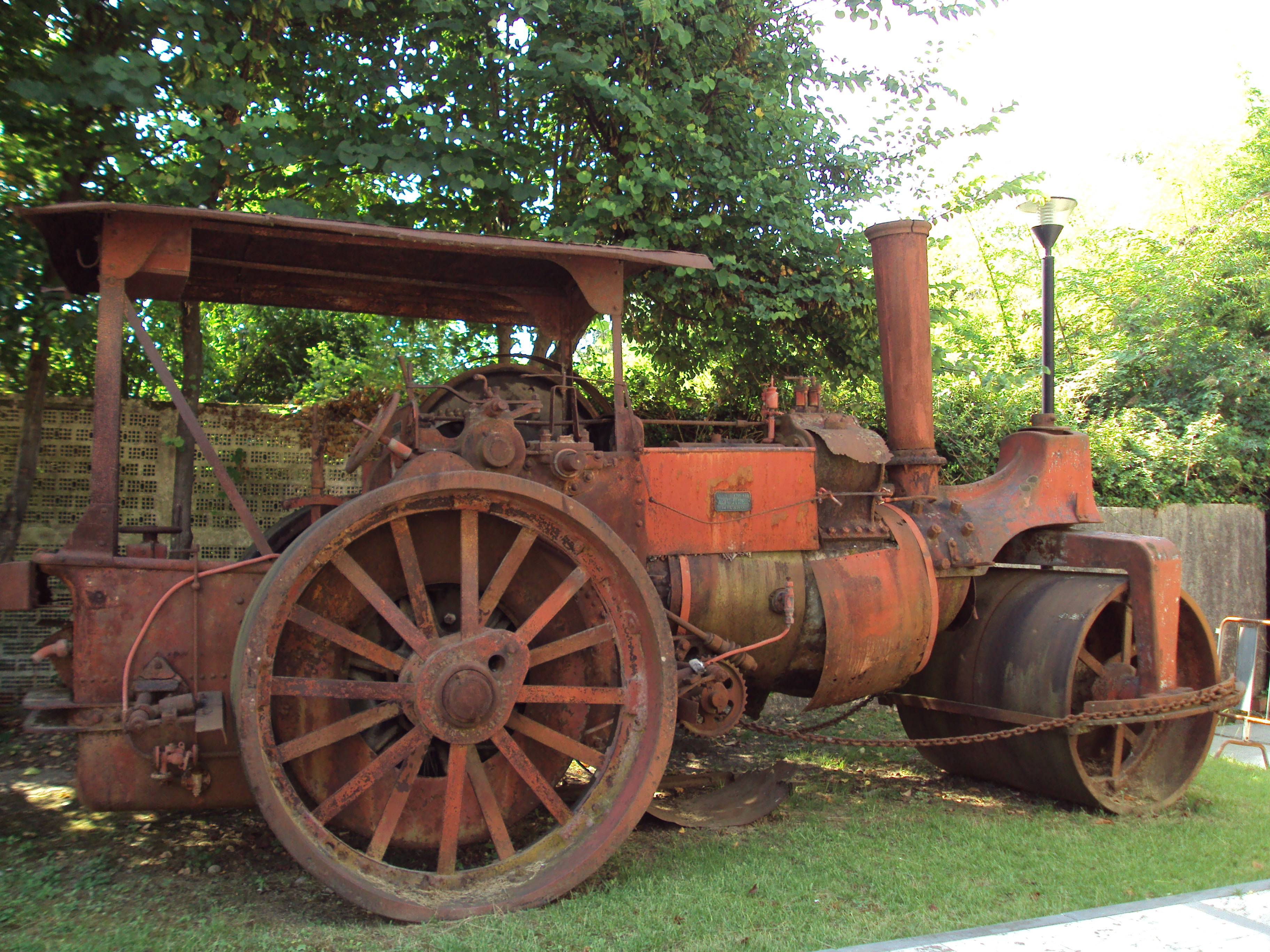 Vagone per il trasporto del marmo, Museo civico del marmo di Carrara - Italia.